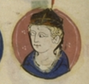 Henry of France, Archbishop of Reims